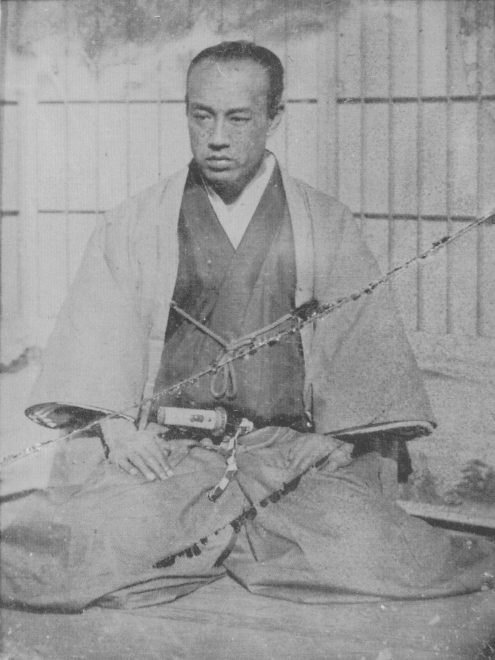 徳川茂徳。Tokugawa Motinaga.湿板写真。